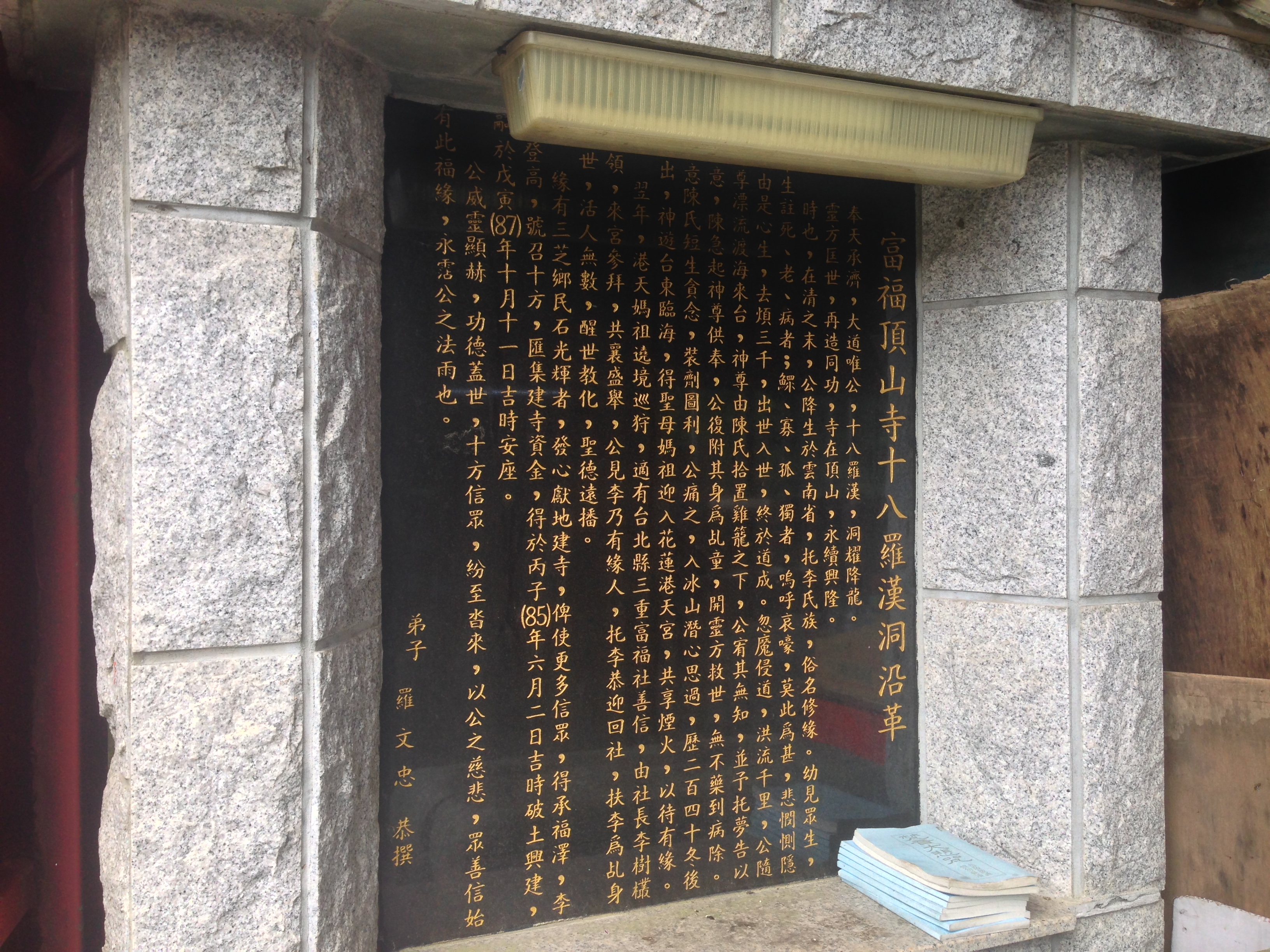 中文（台灣）: 富福頂山寺十八羅漢洞沿革